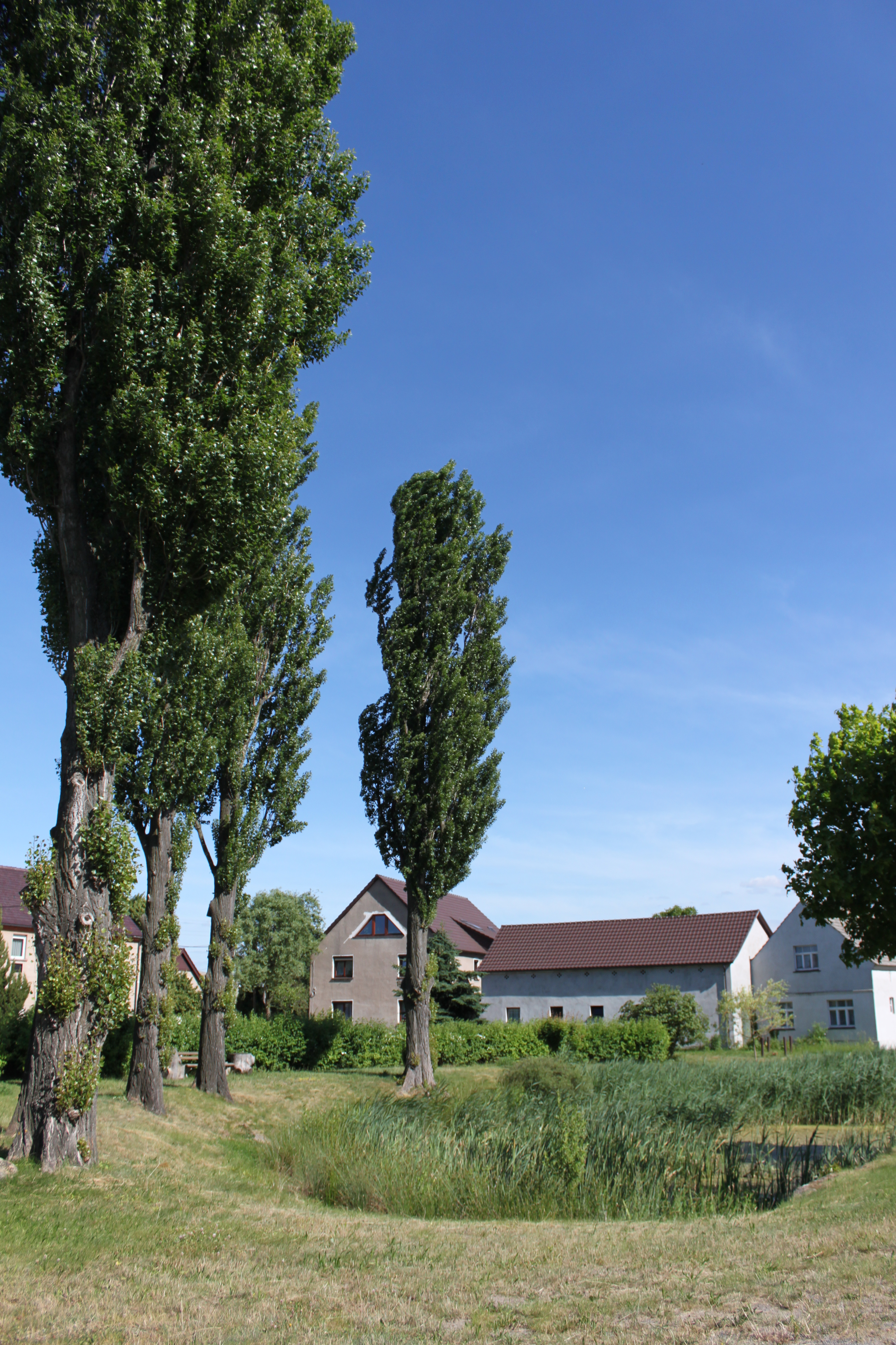 Teich am Kriegerdenkmal